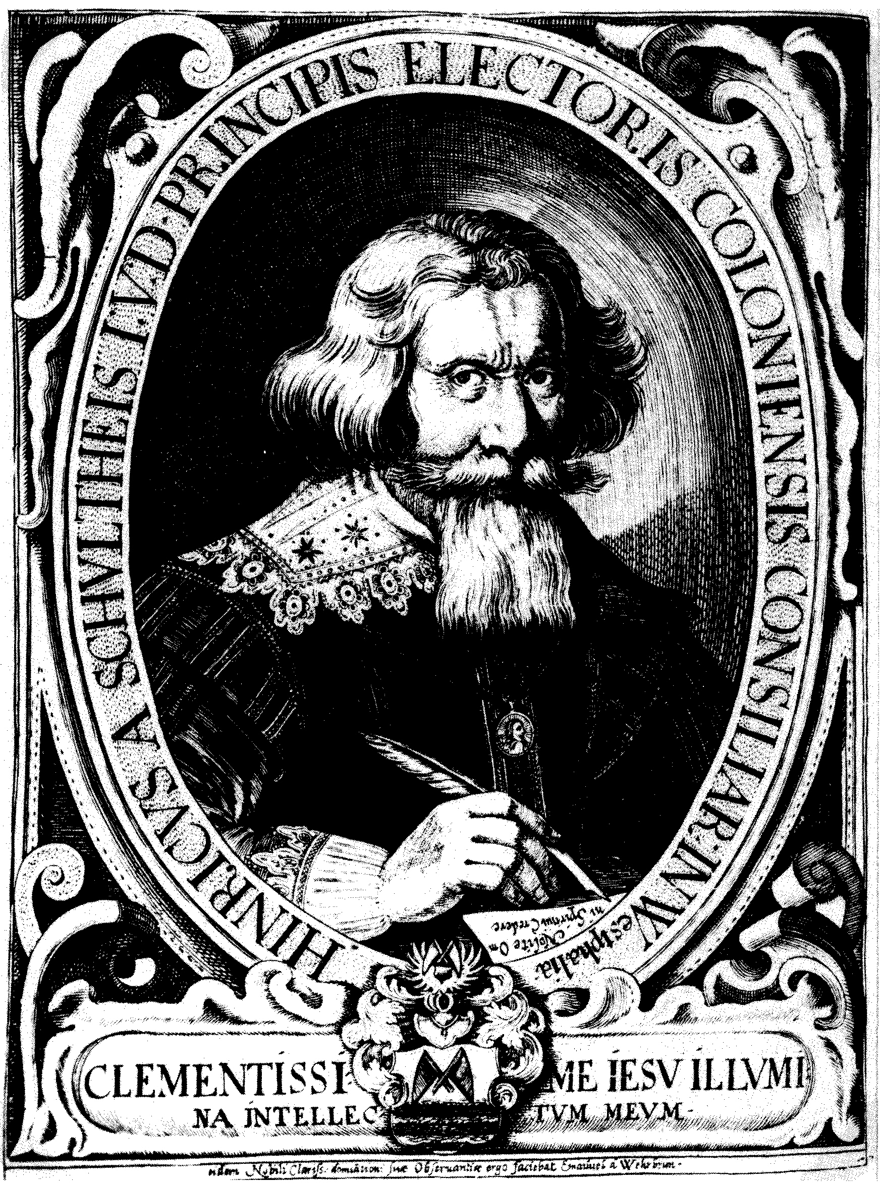 Heinrich von Schultheiß (* 1580 in Scharmede bei Salzkotten im Fürstbistum Paderborn; † 1646 vermutlich in Arnsberg, Herzogtum Westfalen)